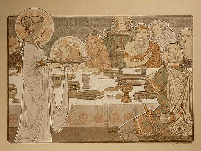 Présentation de la tête du Seigneur d'Halewyn